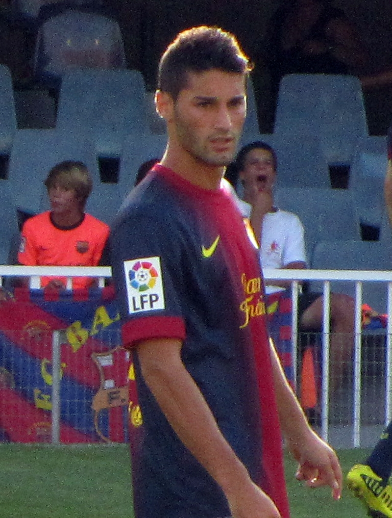 FC Barcelona B player Cristian Lobato in 2012-13 home kit. Foto realizada por Javier Segura (@castroquini)